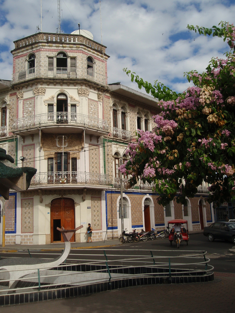 Iquitos